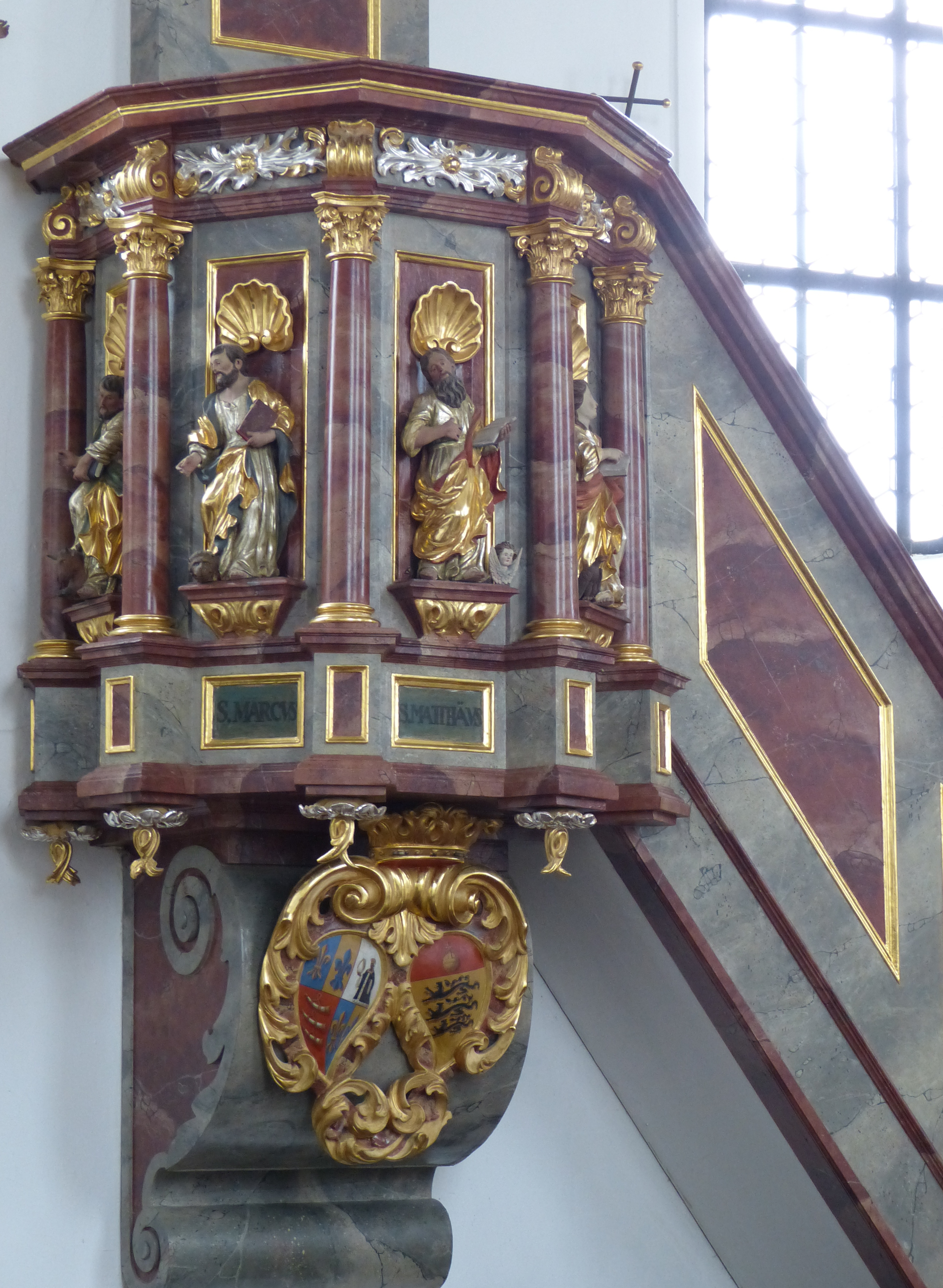 Zum Heiligen Kreuz, Pleß, Landkreis Unterallgäu, Bayern